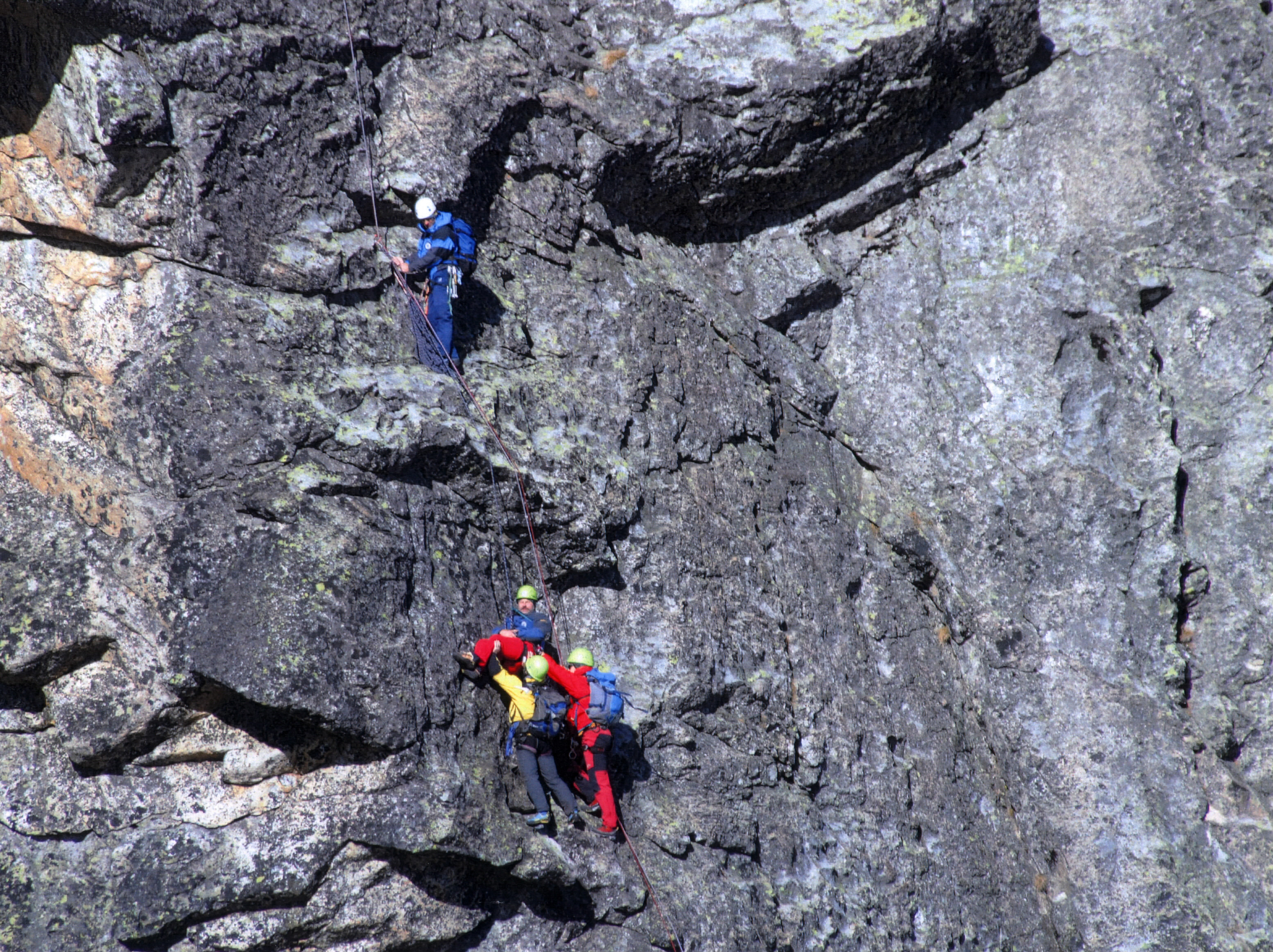 Záchranná akcia Motykova cesta - Široká veža Vysoké Tatry